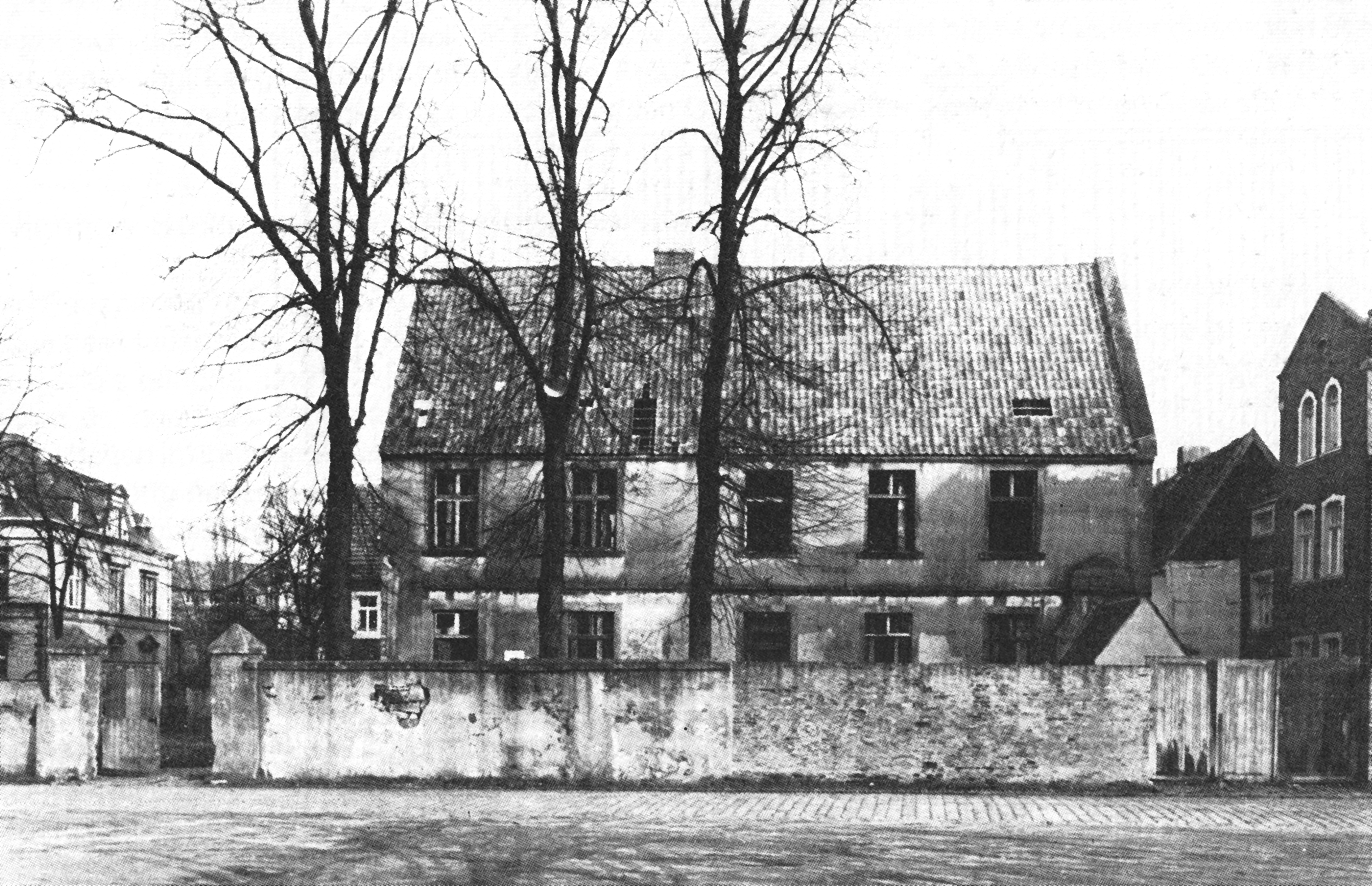 Der Staelscher Hof (Rheine) 1957, kurz vor seinem Abriss